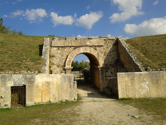 Ingresso settentrionale dell'anfiteatro